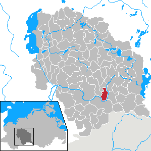 Gischow in Mecklenburg-Vorpommern - District Parchim